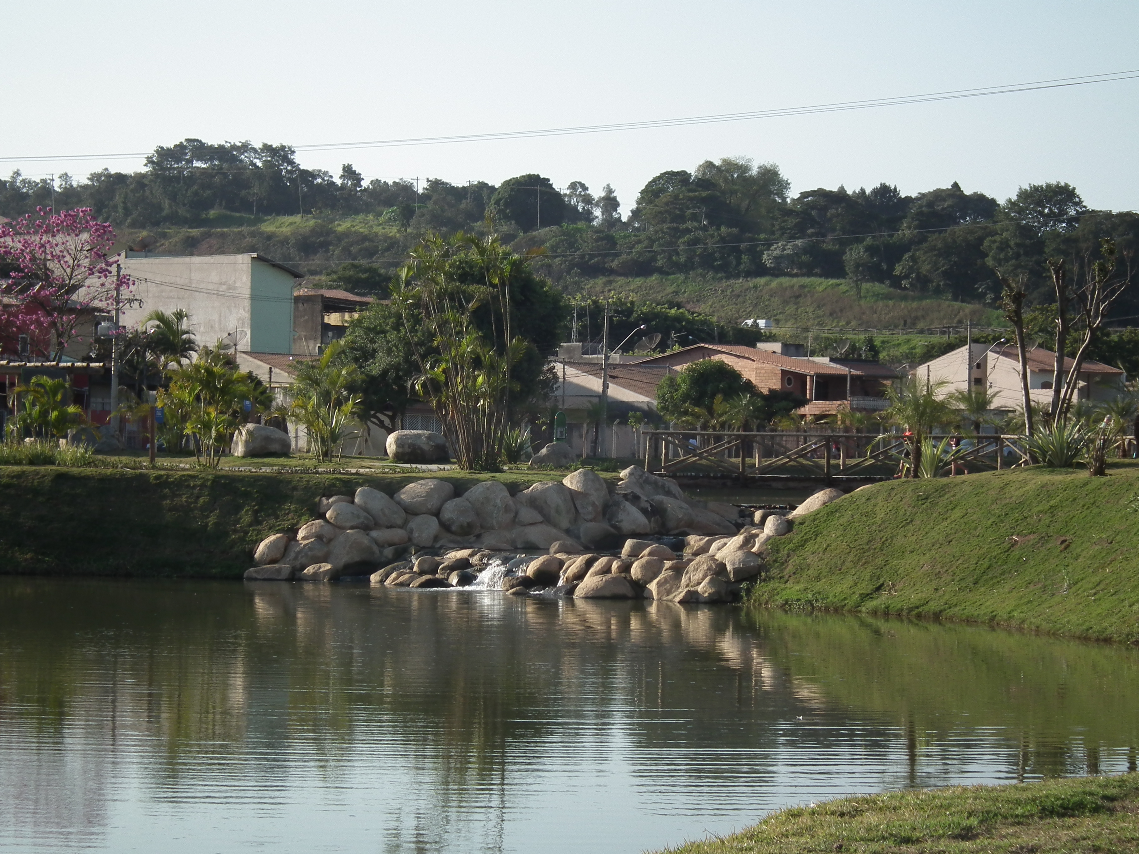 O Parque Botânico Tulipas recebeu o nome de Professor Aziz Ab`Saber, como reconhecimento pelo seu trabalho em favor do meio ambiente, principalmente em defesa do tombamento da Serra do Mar e da Serra do Japi. Já falecido, o professor Aziz foi representado durante a entrega do parque pela esposa Cléa, pelo filho Tales e demais membros da família.